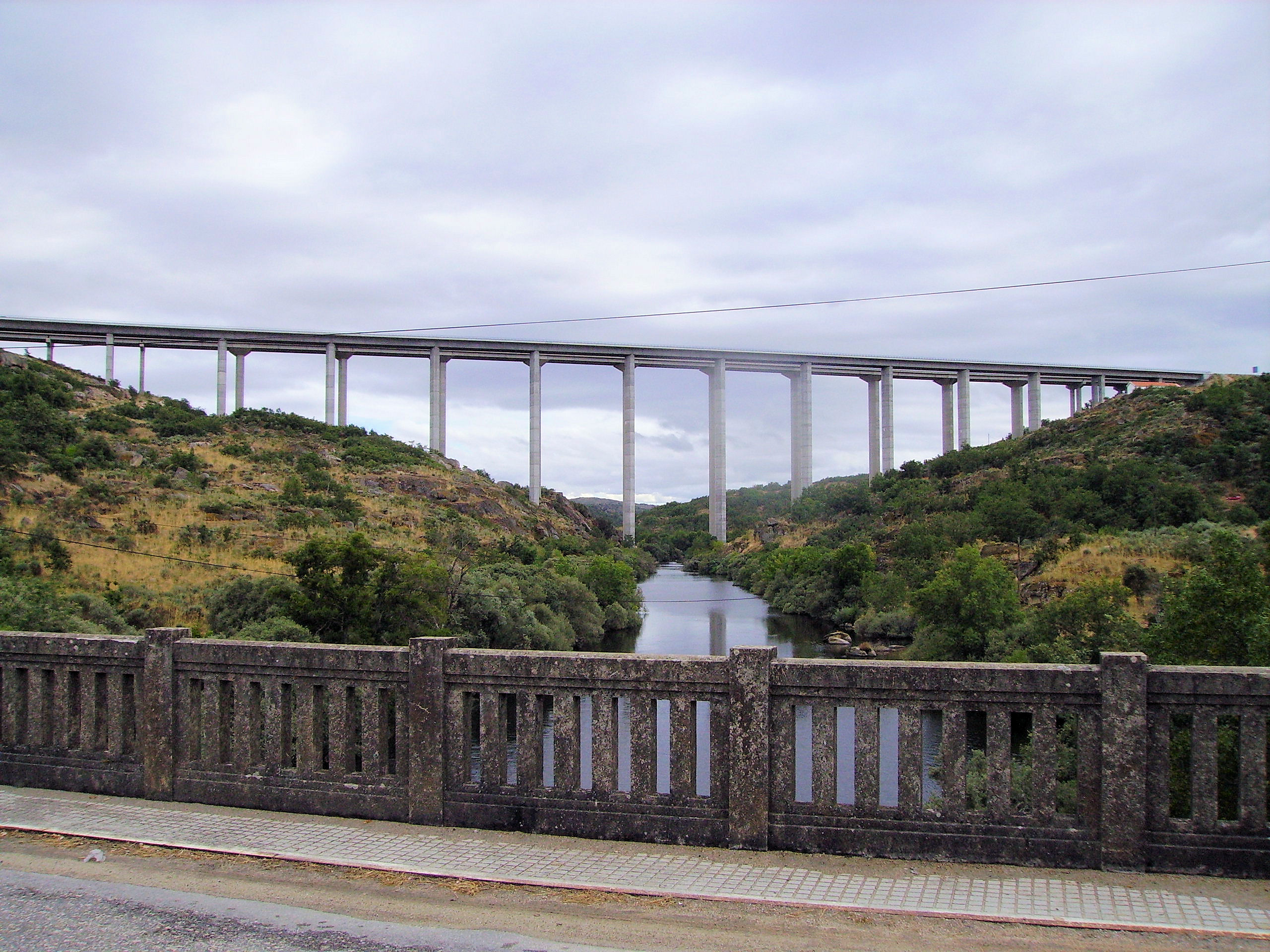 Viaduc autoroute A25 au nord du Portugal